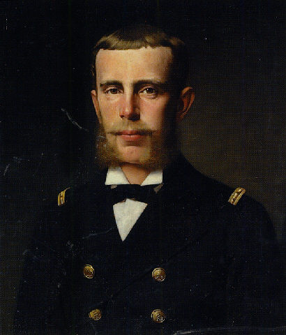 Porträt Kronprinz Rudolf in der Uniform eines Korvettenkapitäns der k.u.k Kriegsmarine.